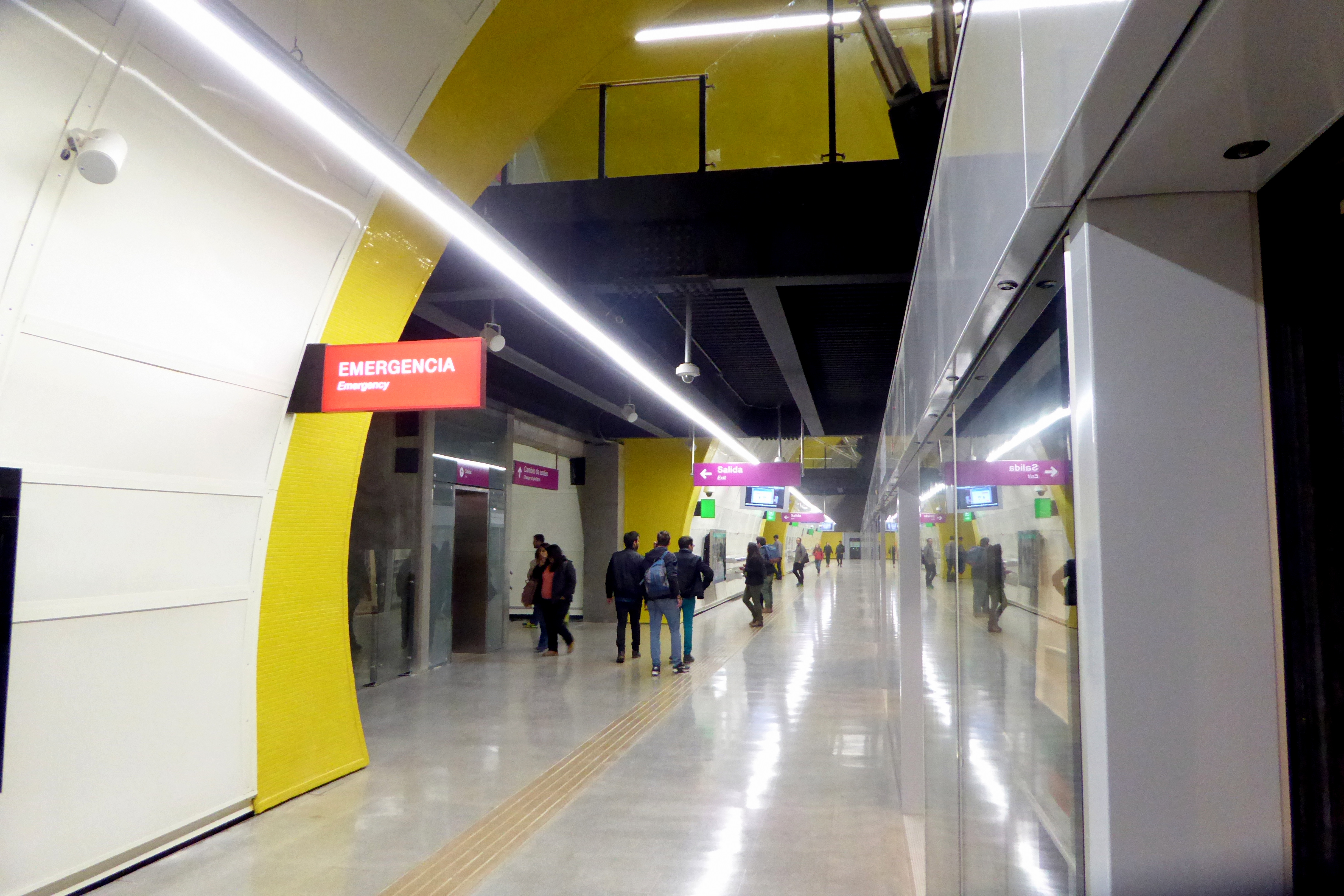 Vista del andén dirección Los Leones en Ñuñoa, Línea 6 del Metro de Santiago.